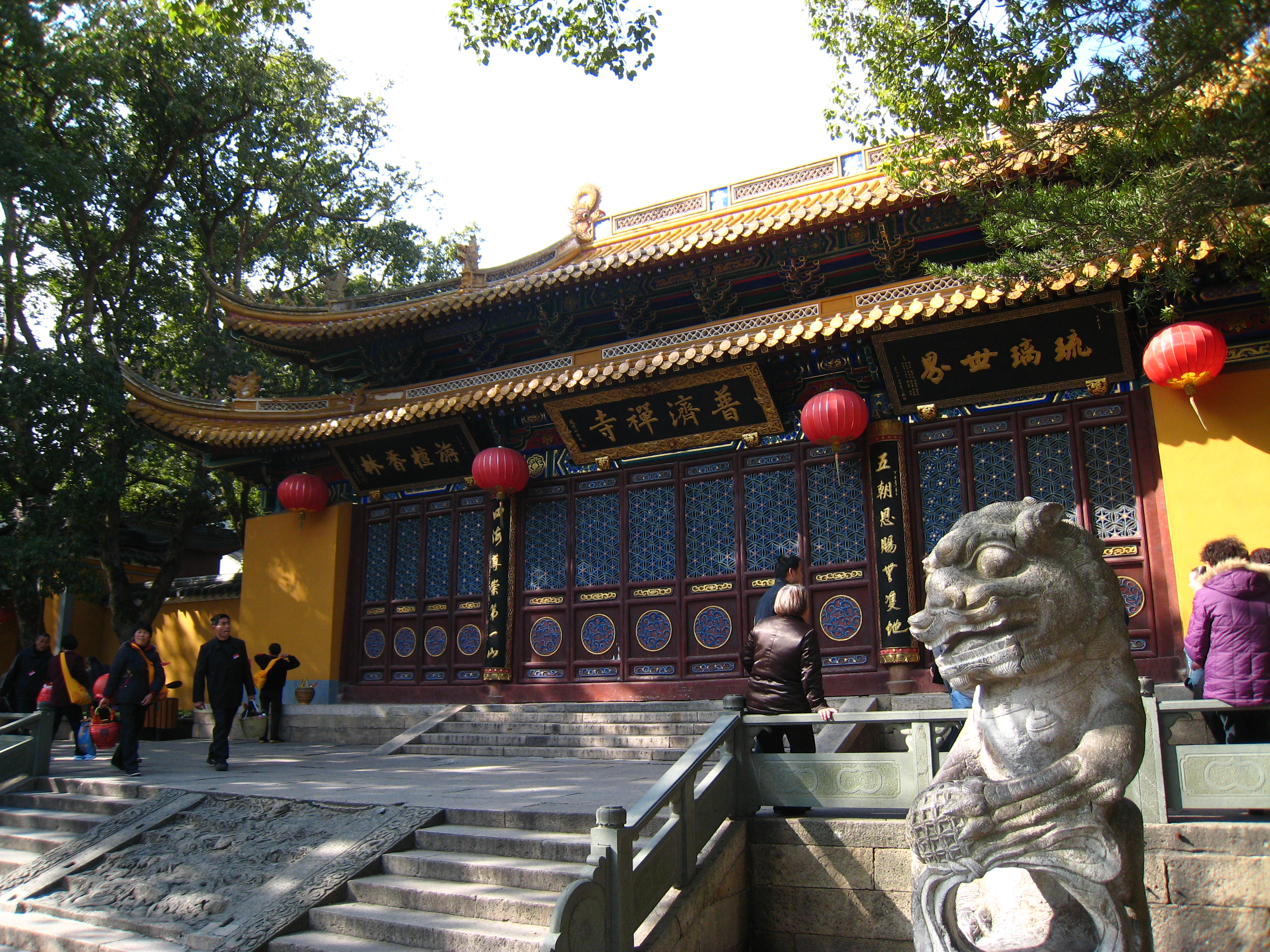 普济禅寺